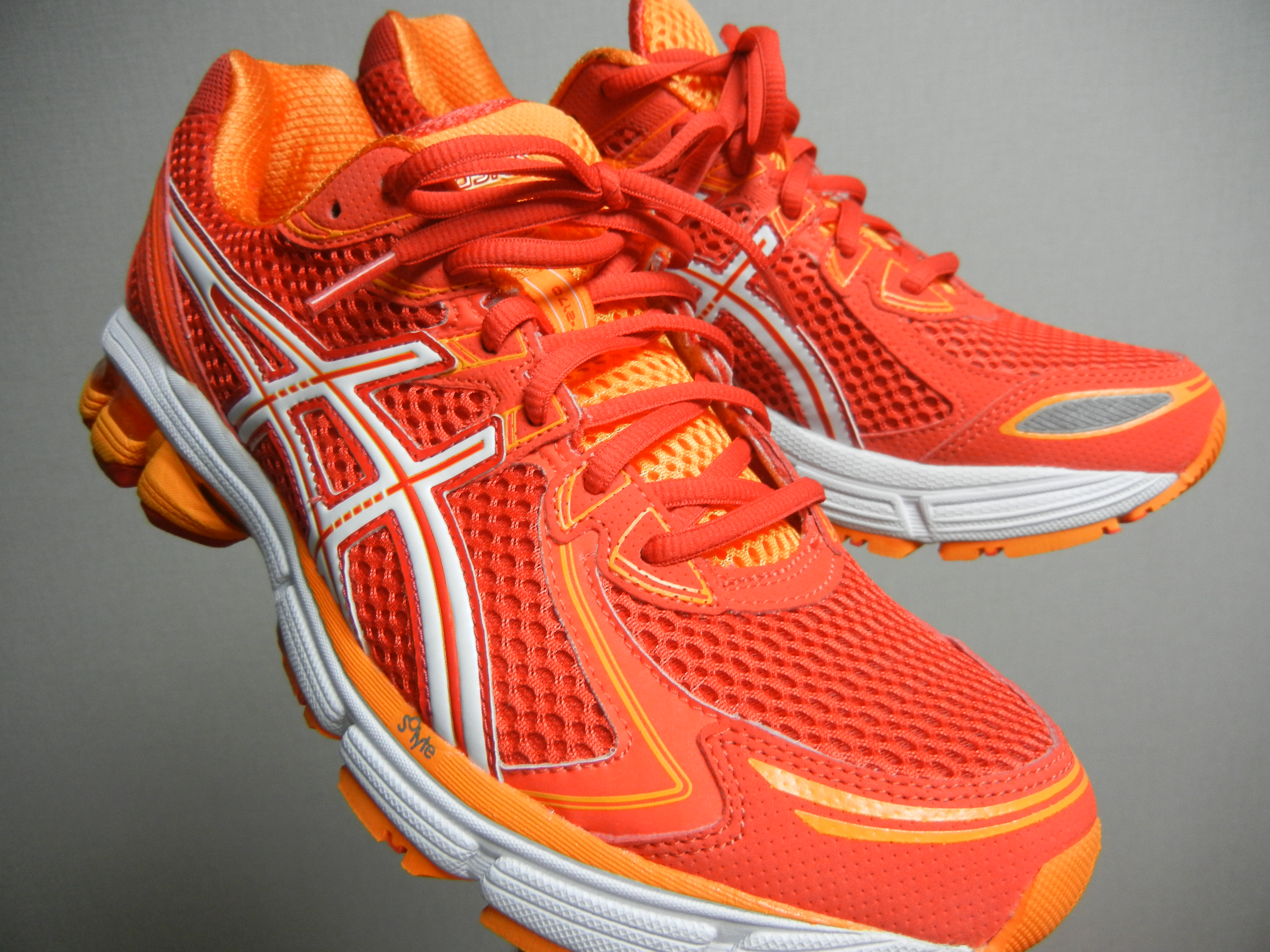 ランニングシューズ